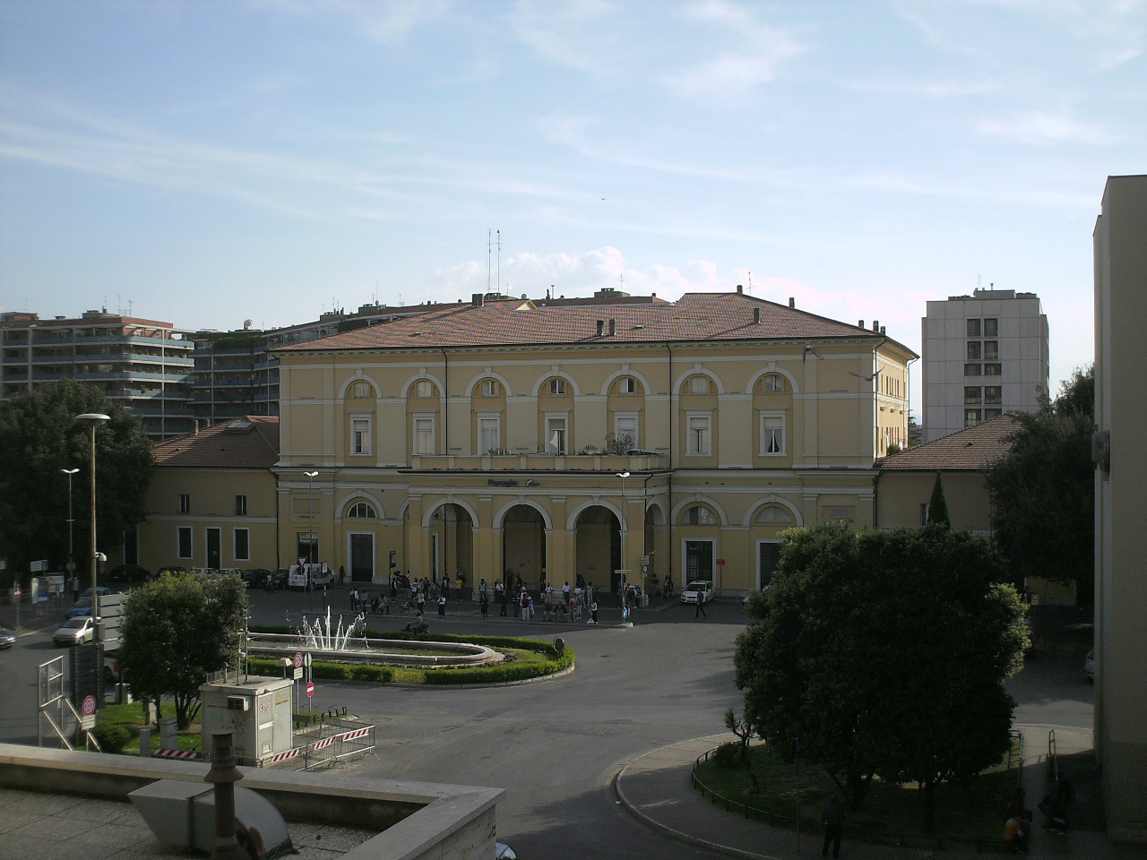 Sullo sfondo l'edificio della stazione F.S. Dinanzi la piazza la fontana e la centralina di controllo della qualità dell'aria (le strade adiacenti sono molto trafficate).